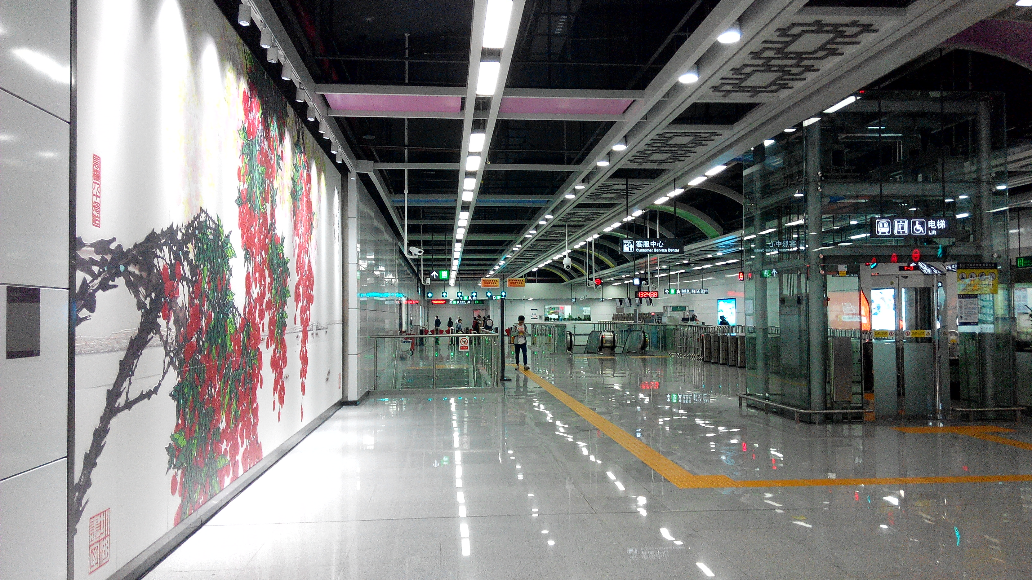 深圳地铁9号线 人民南站站厅